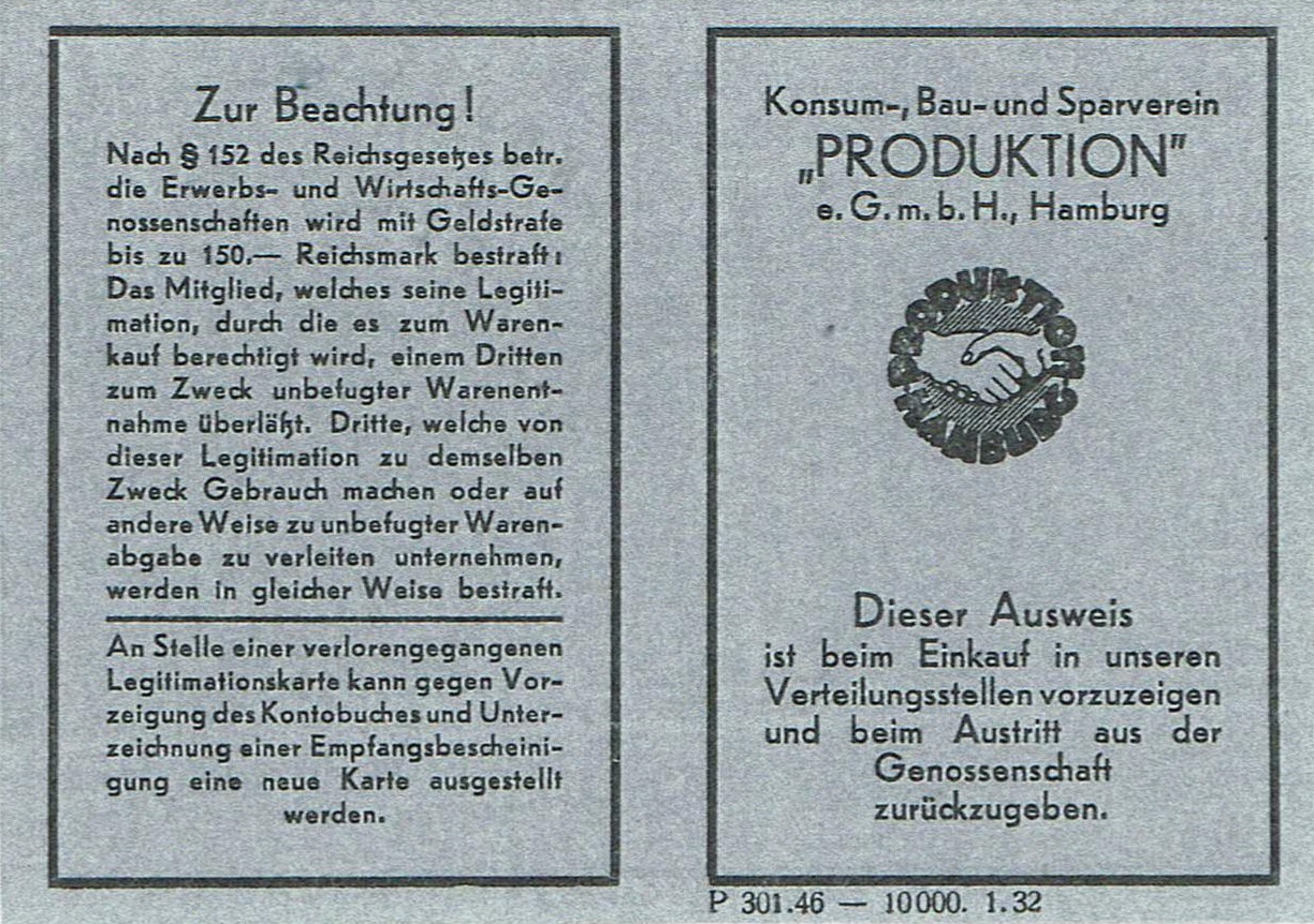 Mitgliedausweis der PRO in Hamburg vor 1933